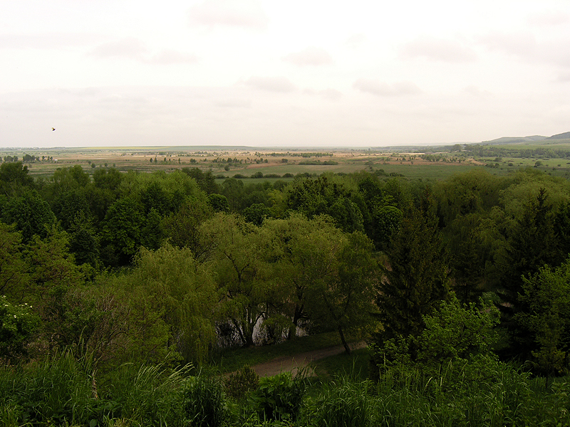 Olesko Castle